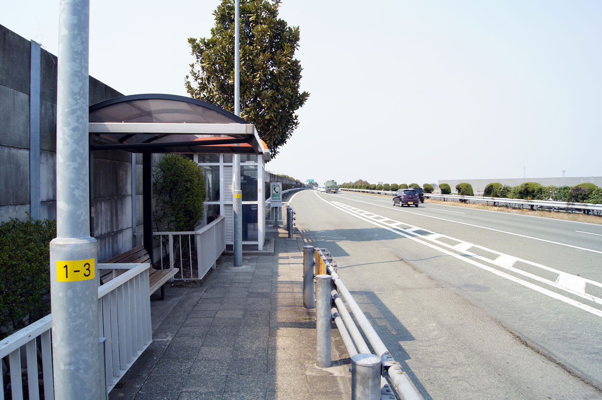 九州自動車道 西合志バス停留所 上り（福岡・門司方面）